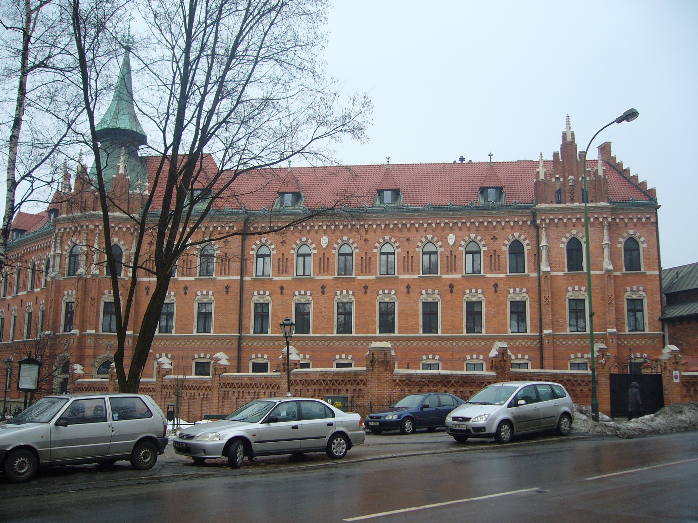 Wyższe Seminarium Duchowne Archidiecezji Krakowskiej